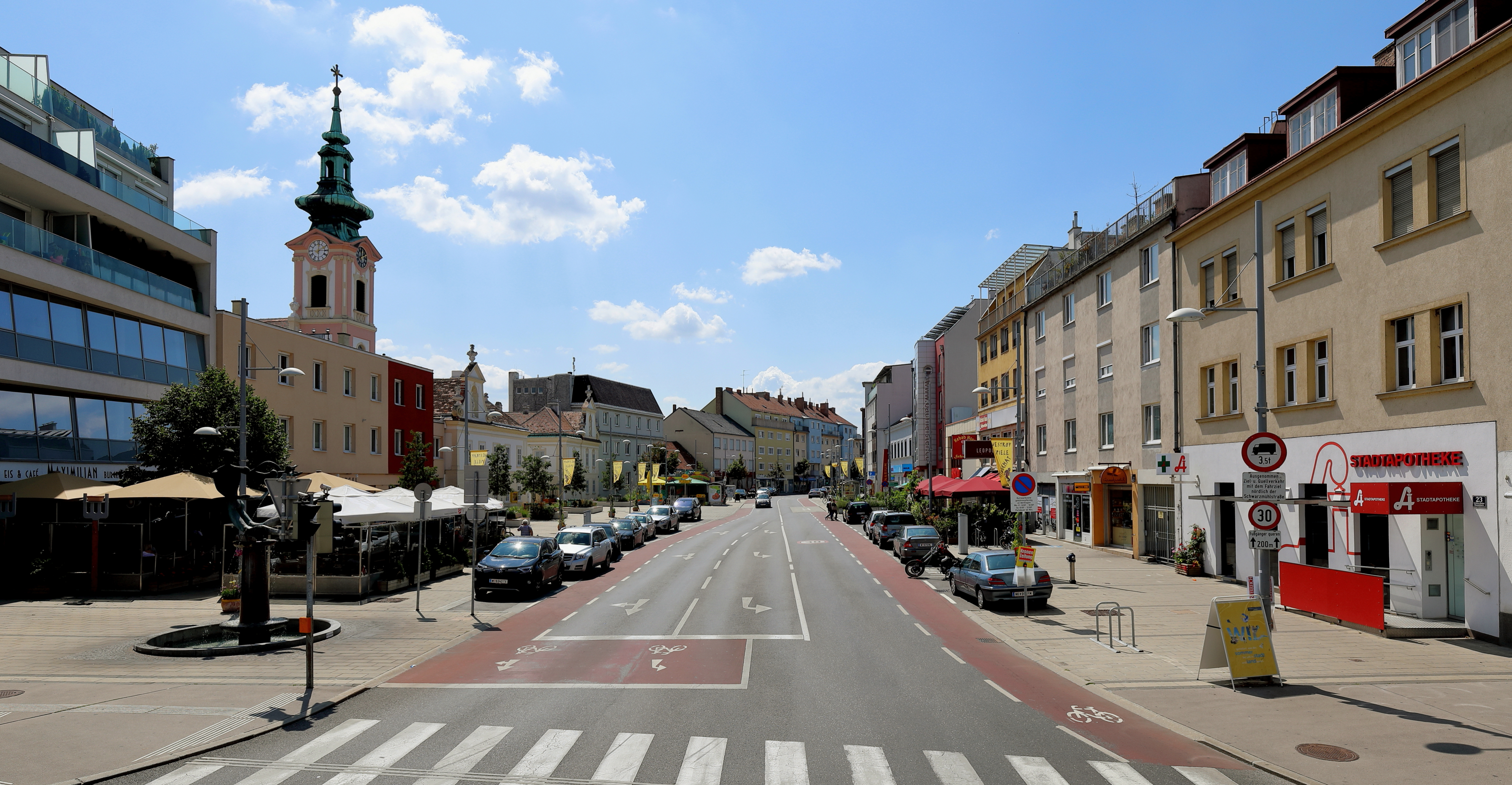 Nordansicht des Hauptplatzes der niederösterreichischen Stadt Schwechat.